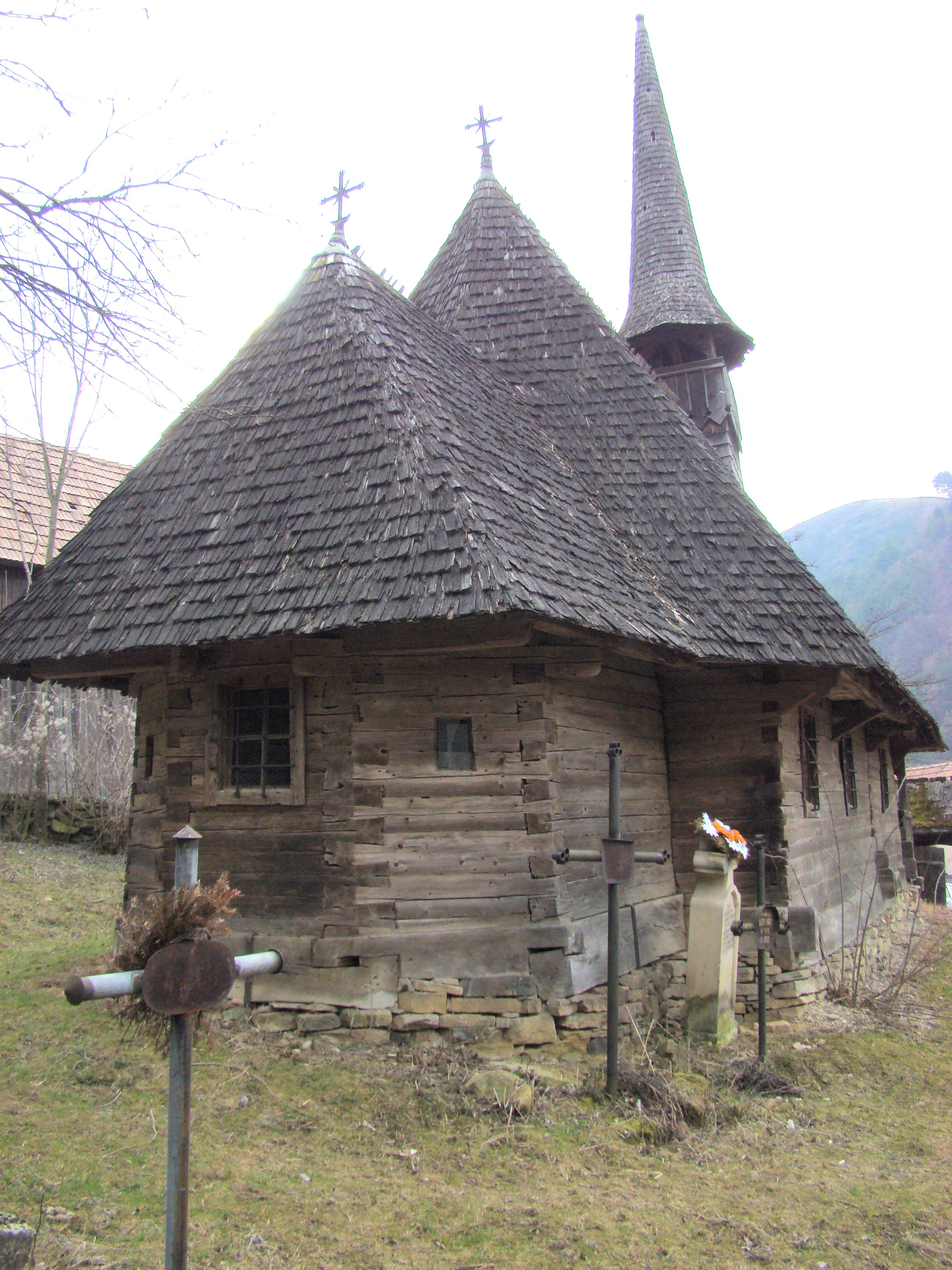 Biserica de lemn „Pogorârea Sf.Duh” din Someșu Rece, județul Cluj